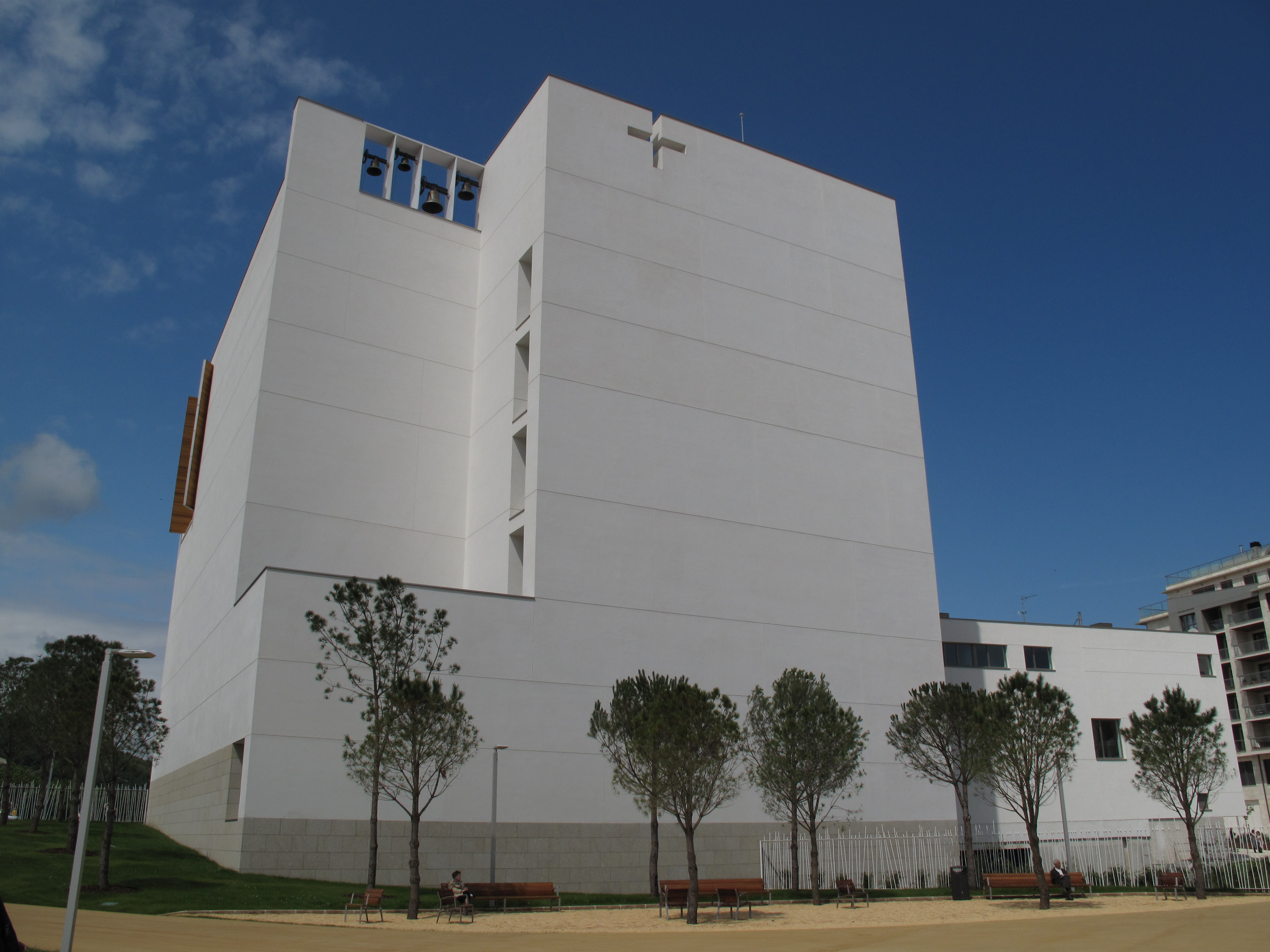 Iglesia de Iesu en Donostia. Obra de Rafael Moneo en 2011.